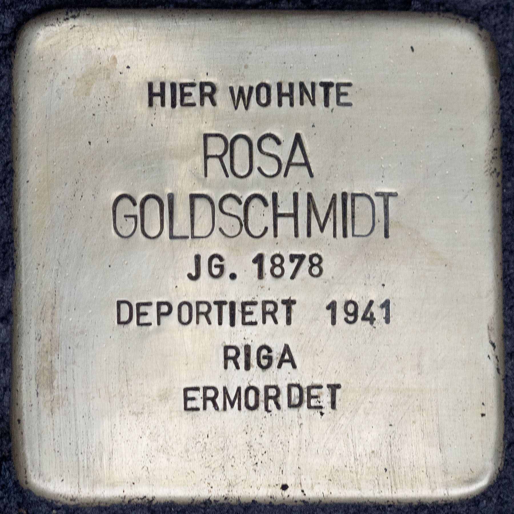 Stolpersteine Kempen: Rosa Goldschmidt